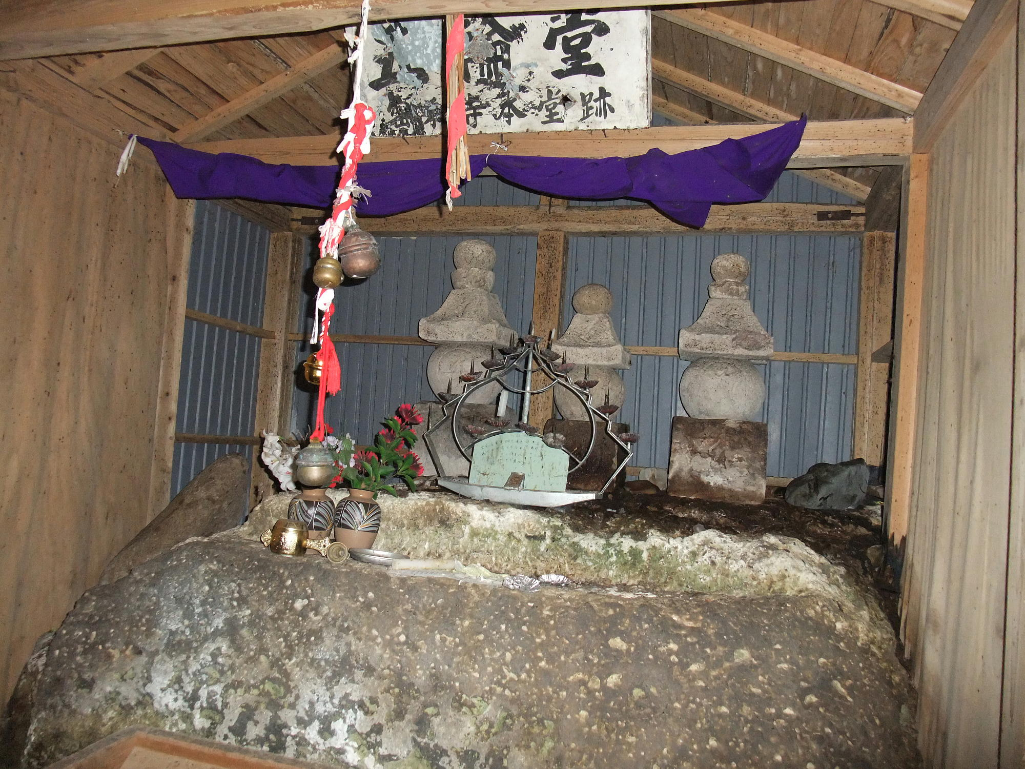 五輪堂（能代市 二ツ井町 高山神社）